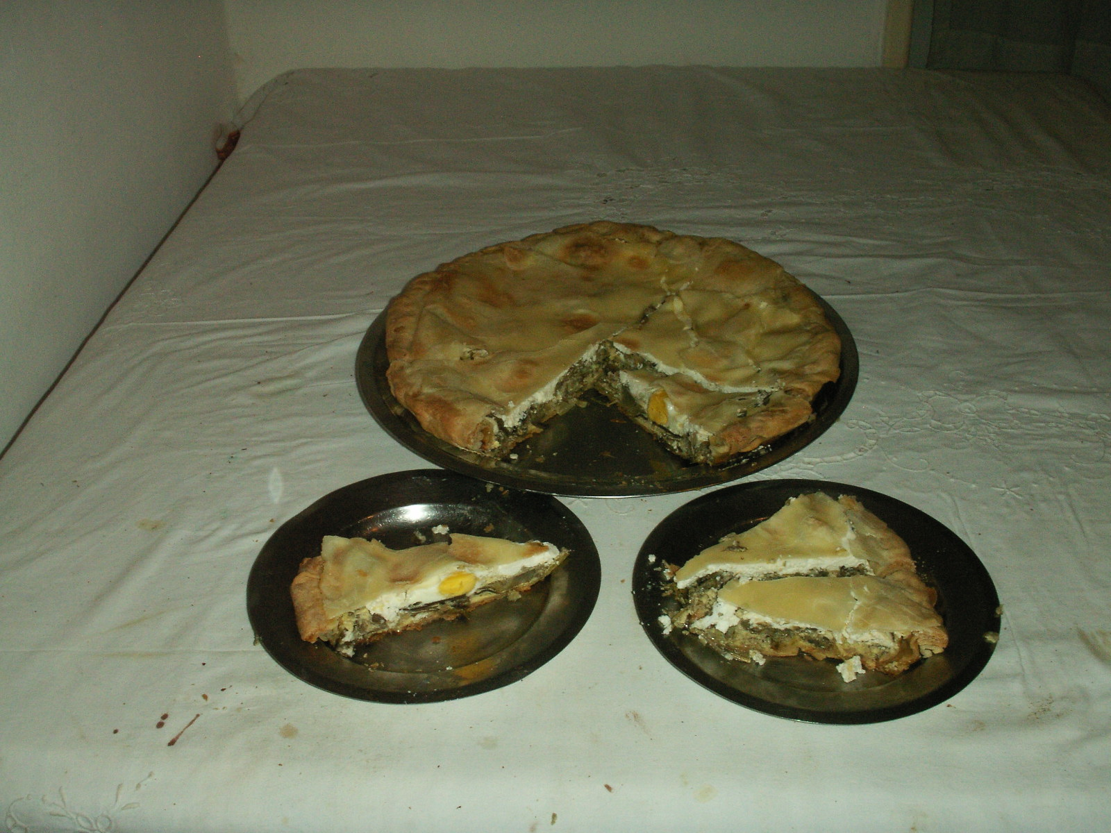 Torta pasqualina a fette